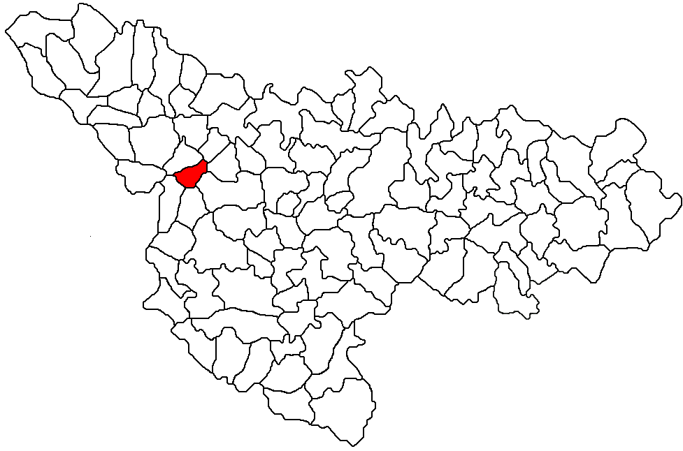 Carpinis, judetul Timis Licensing Categorie:Hărţi ale judeţului Timiş